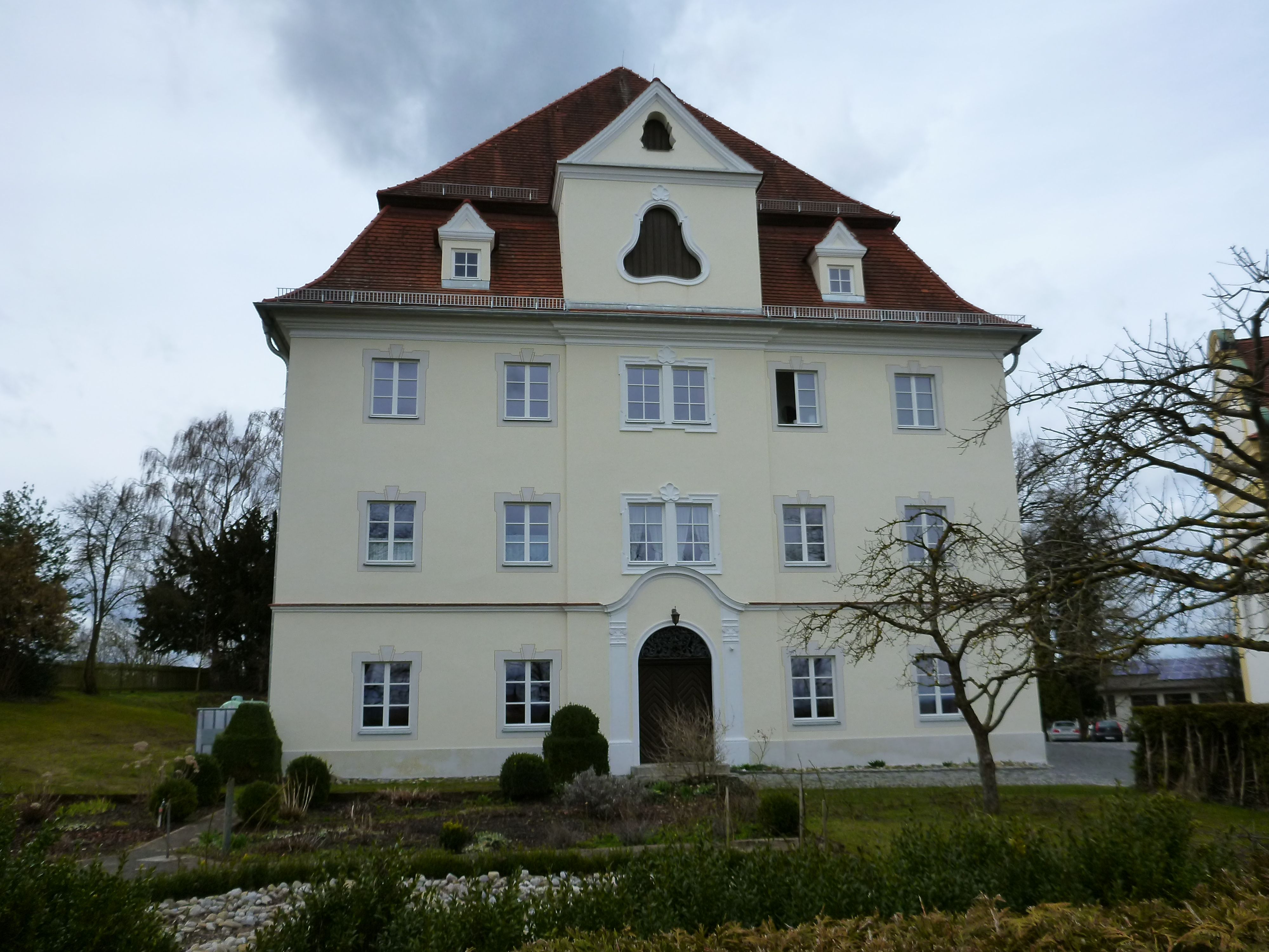 Pfarrhof, dreigeschossiger Bau mit Mansardwalmdach und Mittelrisaliten im Norden, Osten und Süden mit Zwerchgiebeln bekrönt, von Johann Bernhard Nigg, 1765.